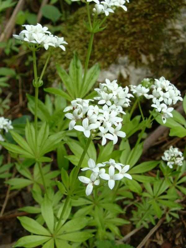 Galium odoratum Aspérule odorante, Gy